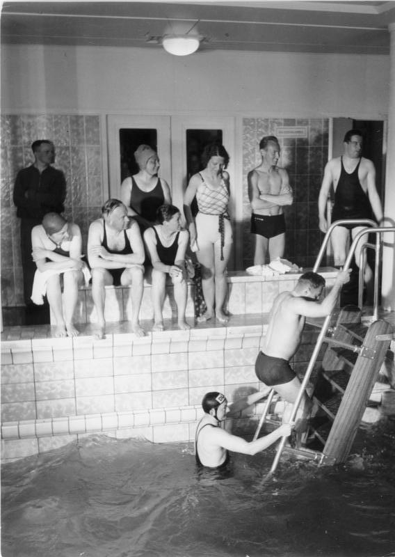 Schwimmbad auf der "Wilhelm Gustloff"